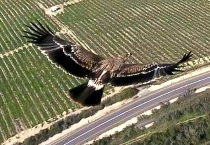 עיט שמש דואה מעל תל ראש המזוהה כ'בית שמש נפתלי' ליד הישוב אלקוש.